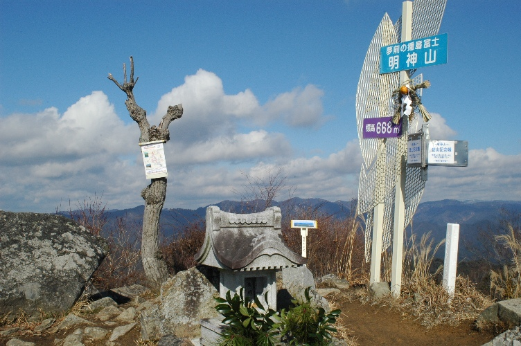 夢前の播磨富士・明神山山頂